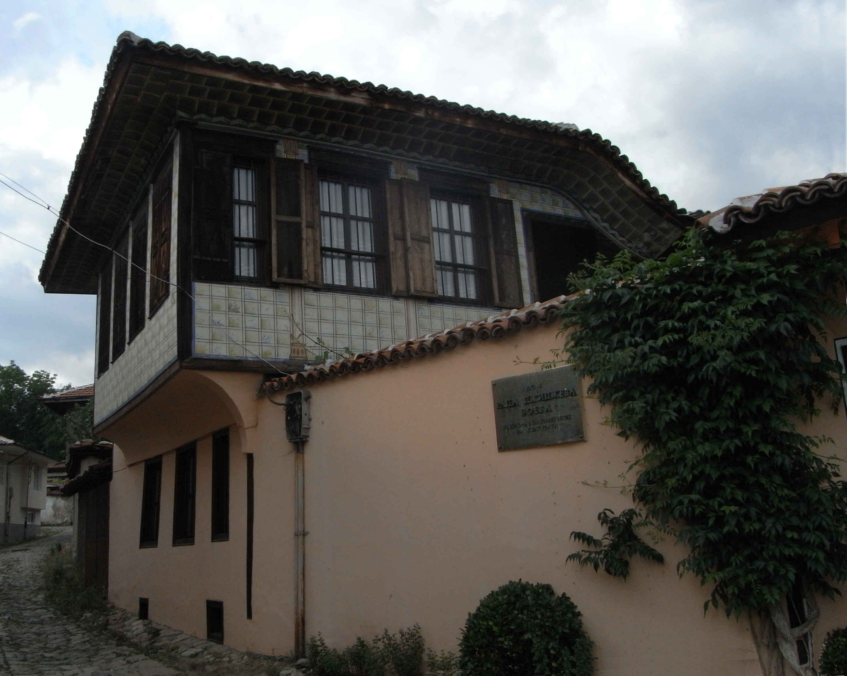 Rada-Dshidshewa-Soewa-Haus in Karlovo, nationales Kulturdenkmal.